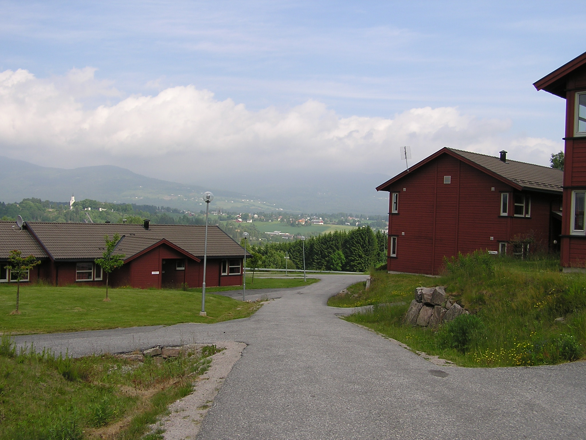 Breisås studentbustader i Bø i Telemark